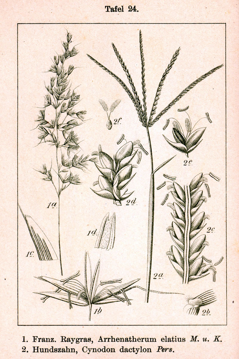 1. Arrhenatherum elatius (L.) P.Beauv. ex J.Presl & C.Presl 2. Cynodon dactylon (L.) Pers. Original Description 1. Franz. Raygras, Arrhenatherum elatius M. u. K. 2. Hundszahn, Cynodon dactylon Pers.